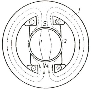 Figura 8.Makina dypolare me pole të theksuara në stator